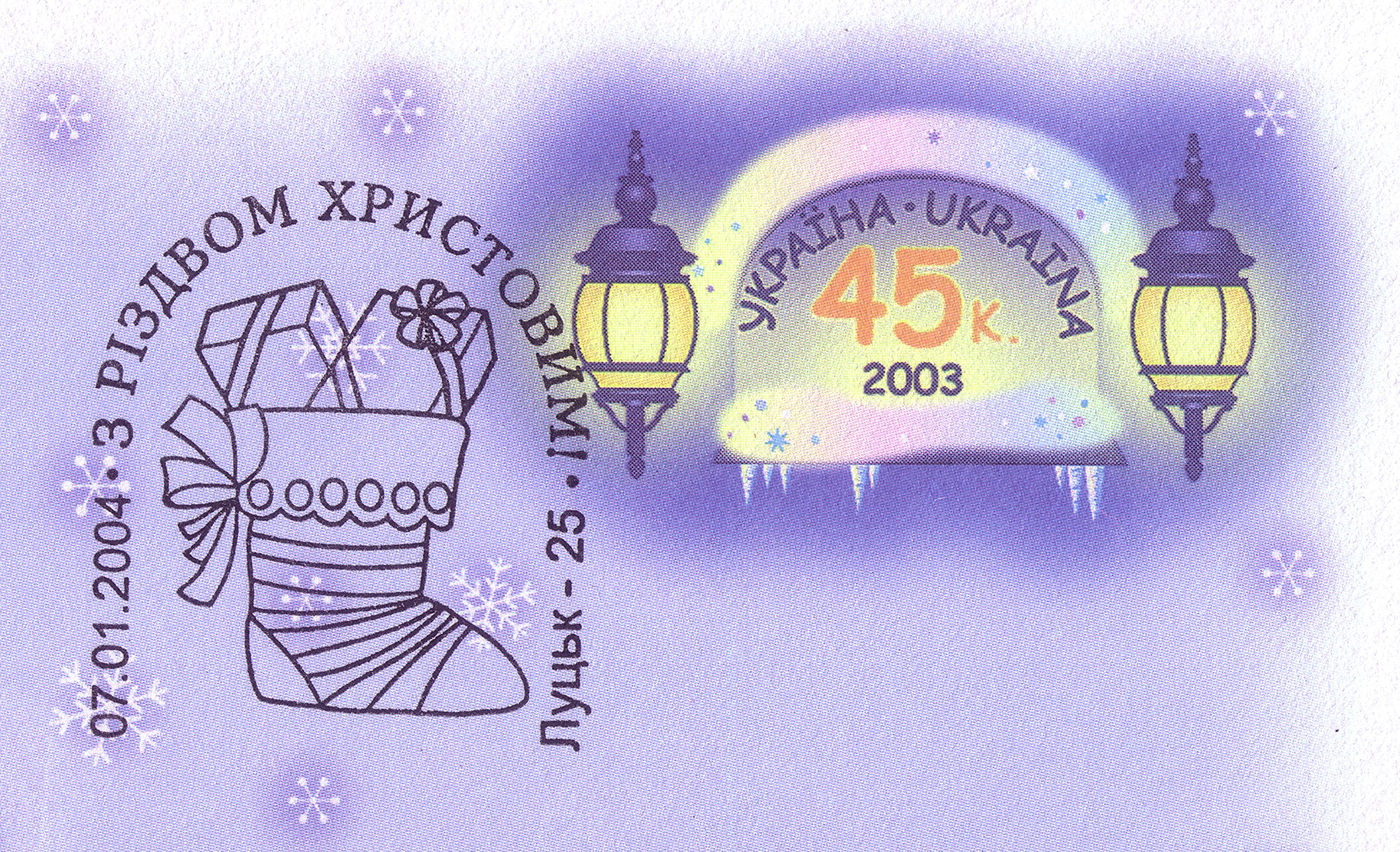 Весёлого Рождества! Спецгашение на православное Рождество 7 января (по православному календарю) 2004 в Луцке-25. Конверт с оригинальной маркой номиналом 45 украинских копеек, выпущен 26.09.2003.